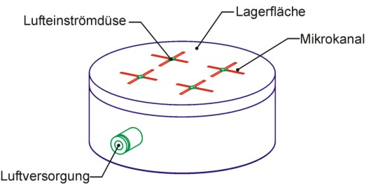 Düsen-Luftlager mit Kammern und Kanälen